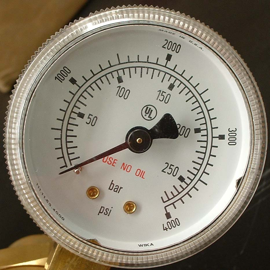 Gauge